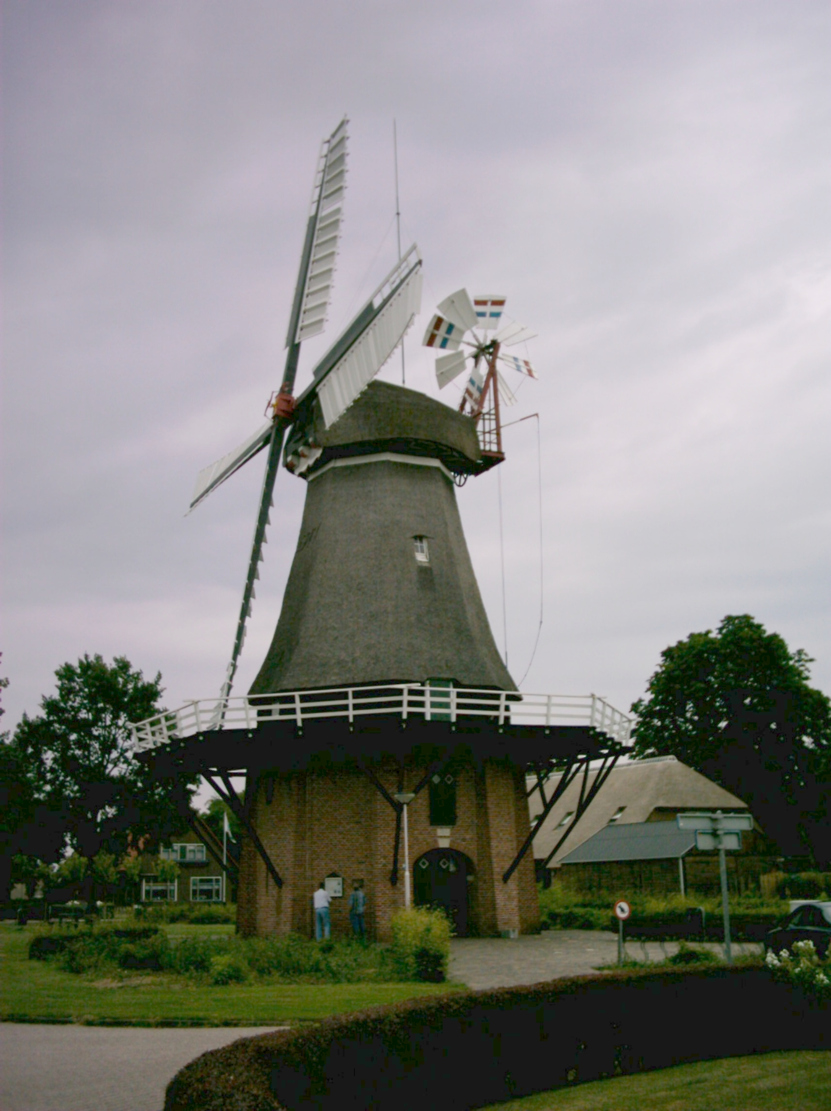 De Sterrenberg